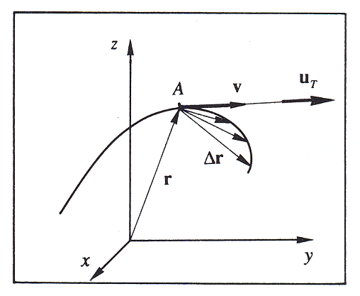 Abiadura bektoreak ibilbidearen ukitzailearen norabidea duela adierazten duen irudia